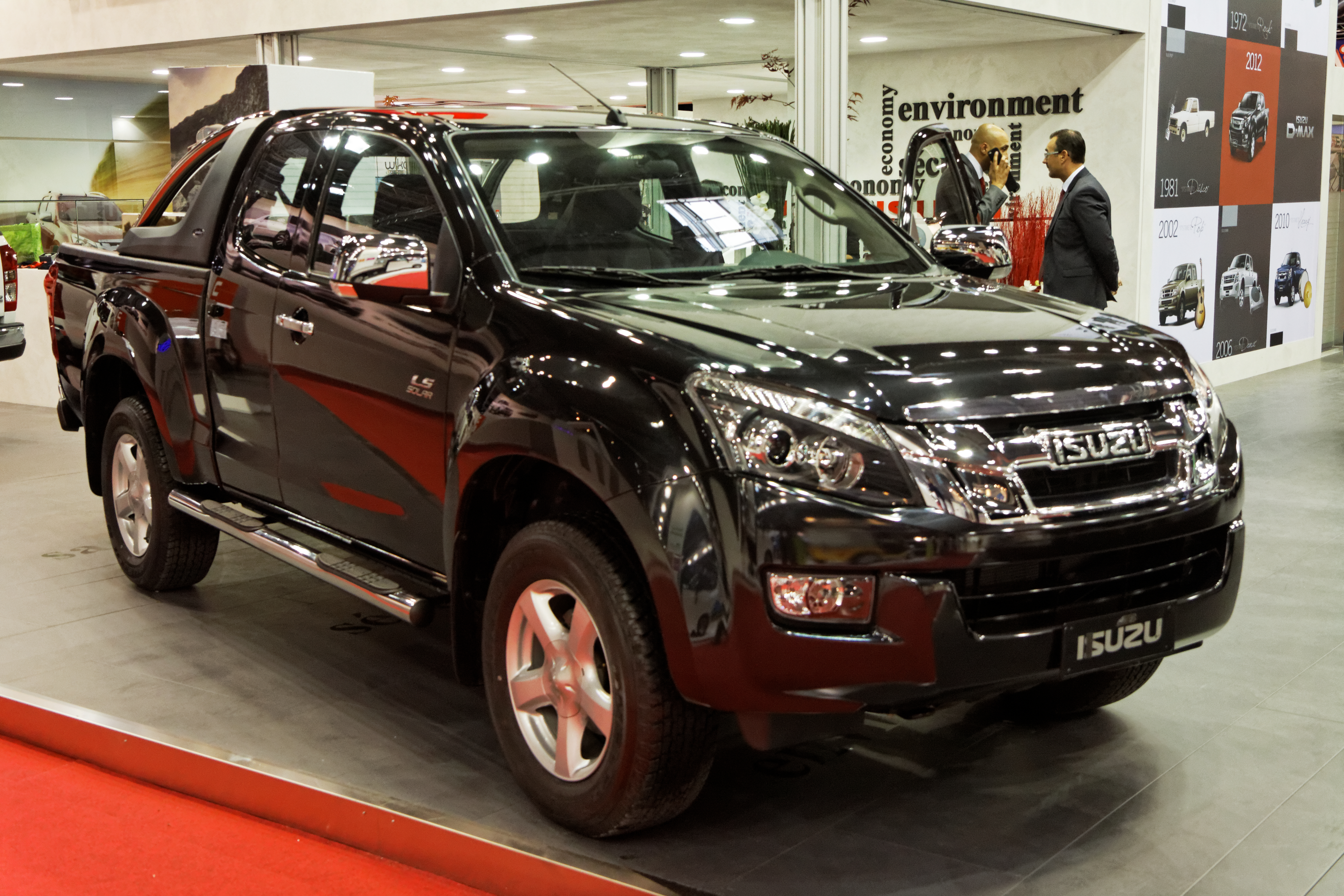 Un D-Max présenté lors du Mondial de l'Automobile de Paris 2012.